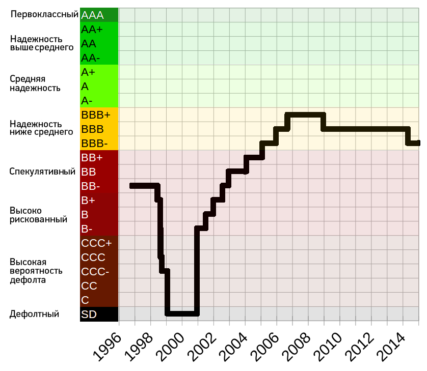 Изменения долгосрочного кредитного рейтинга РФ c 1996 года. Standard & Poor’s, Foreign Currency LT. Источник: Standard & Poor’s. Дополнительные источники: 1, 2, 3, 4. Сокращенные именования категорий - в соответствии с 3.